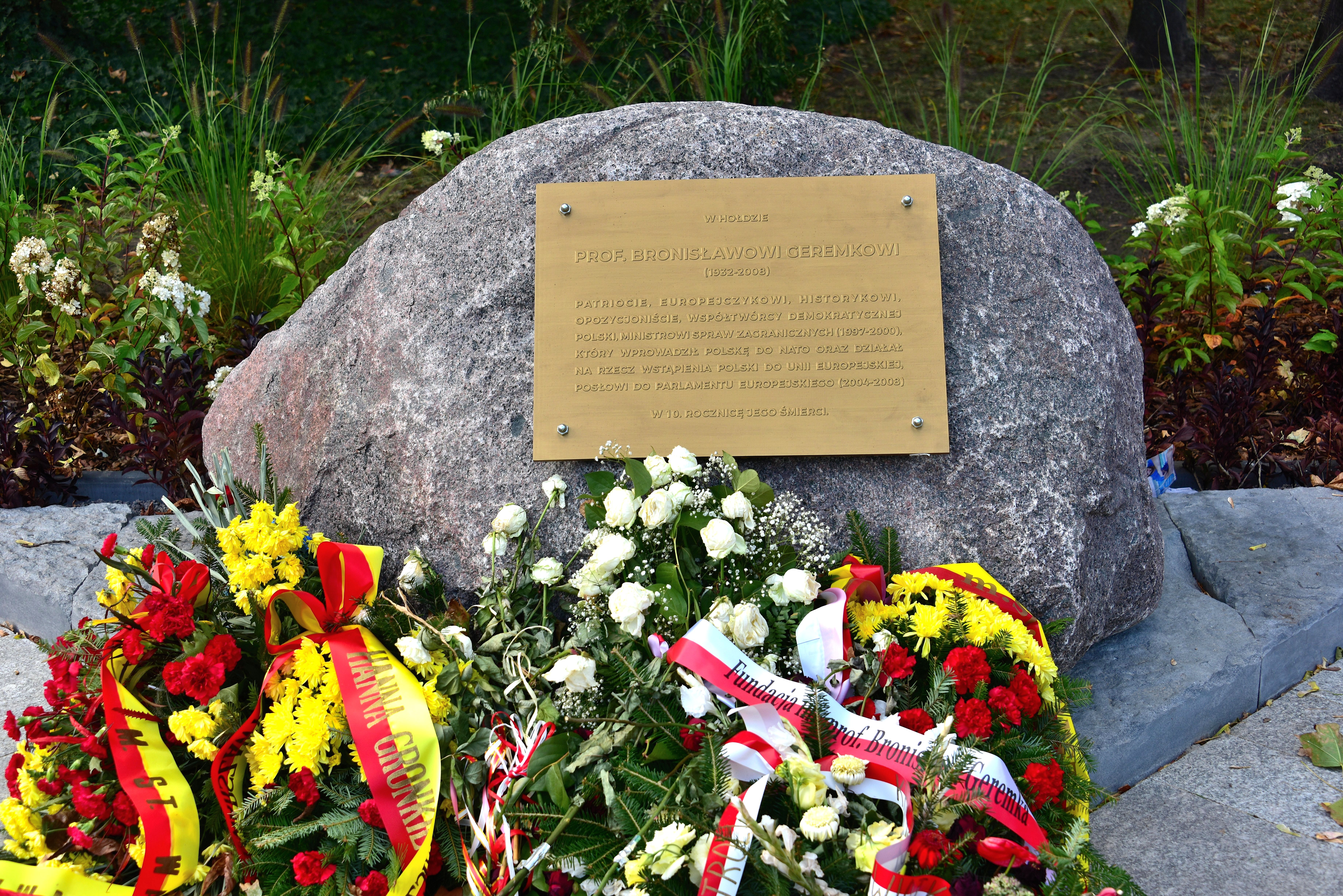 Tablica upamiętniająca Bronisława Geremka na skwerze jego imienia w Warszawie